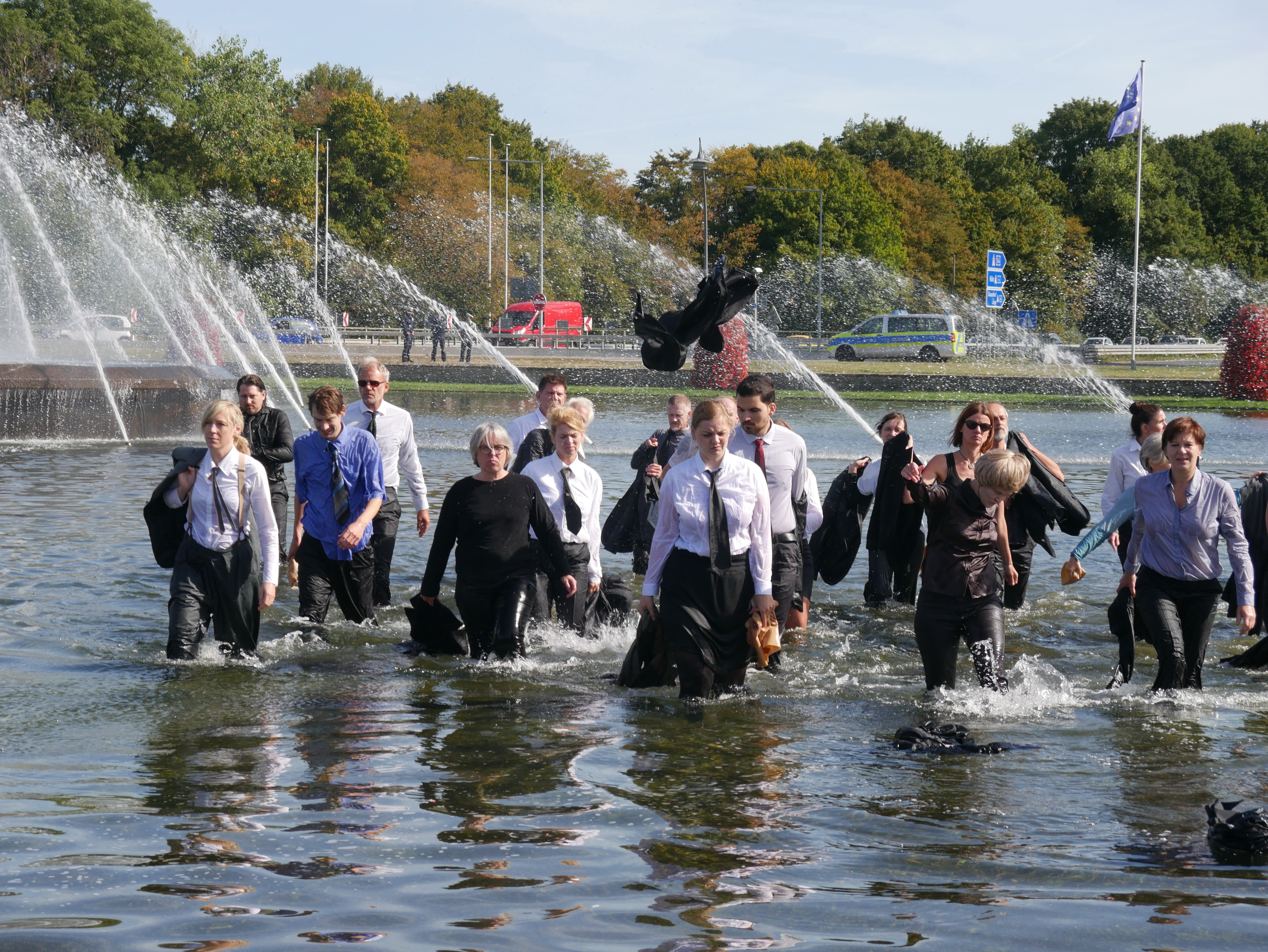 Kunstaktion der Artist for Future